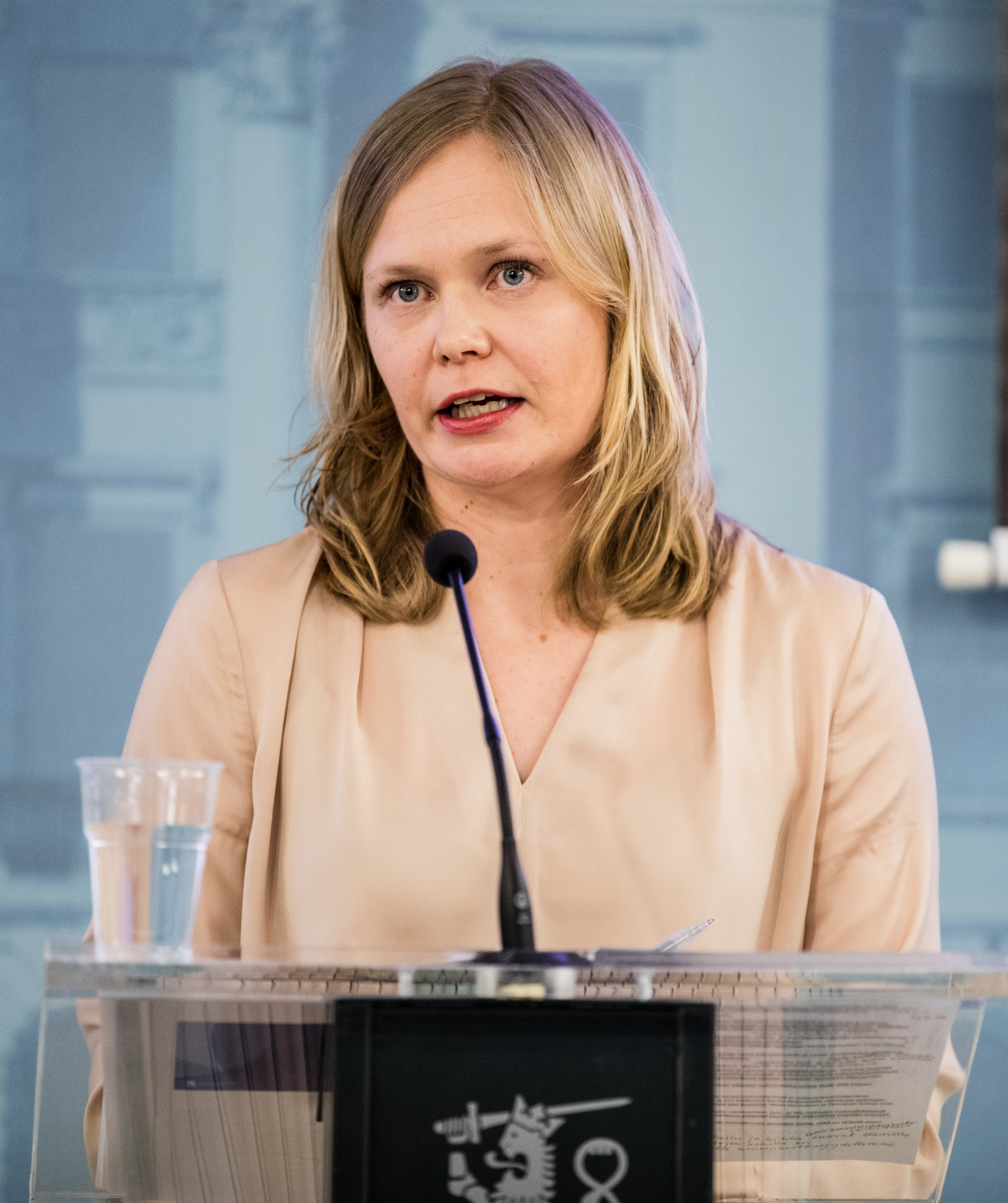 Pääministeri Sanna Marin, opetusministeri Li Andersson ja tiede- ja kulttuuriministeri Hanna Kosonen järjestivät infotilaisuuden 18.3.2020.